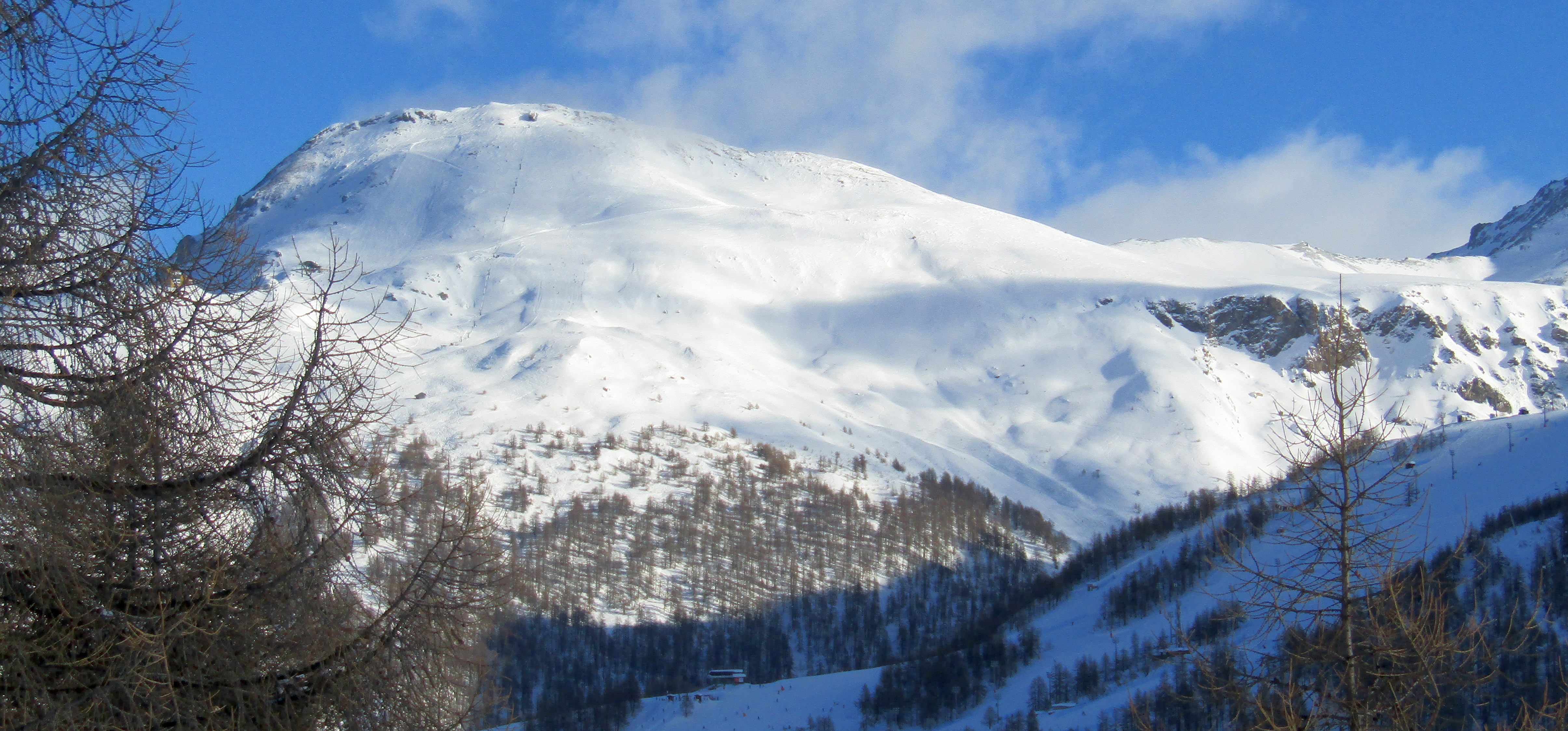 Monte Motta visto dalla pista di fondo delle Marmotte (Sestriere)